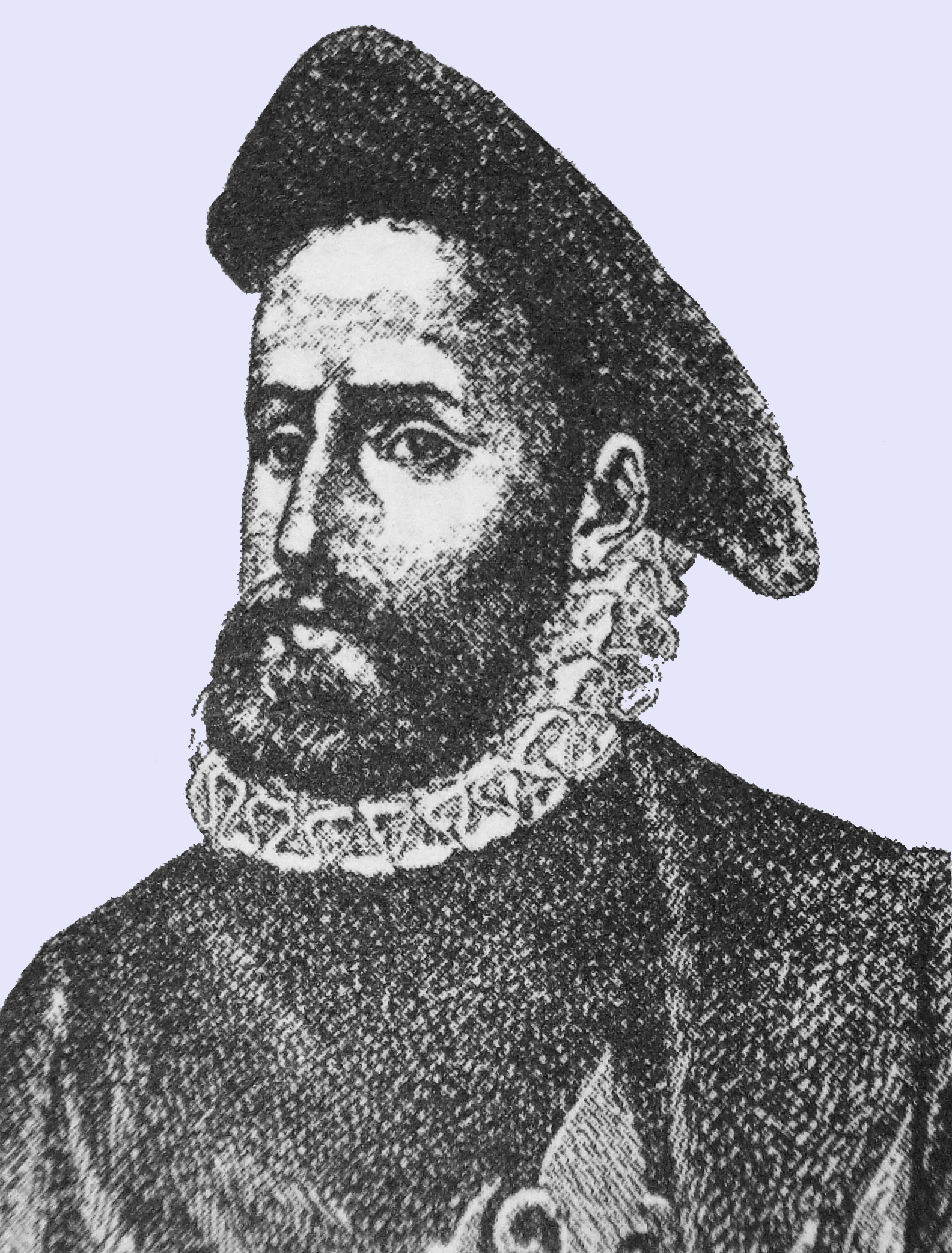 Juan Ramírez de Velasco, conquistador español de fines del siglo XVI, fundador de la ciudad de La Rioja, Argentina.